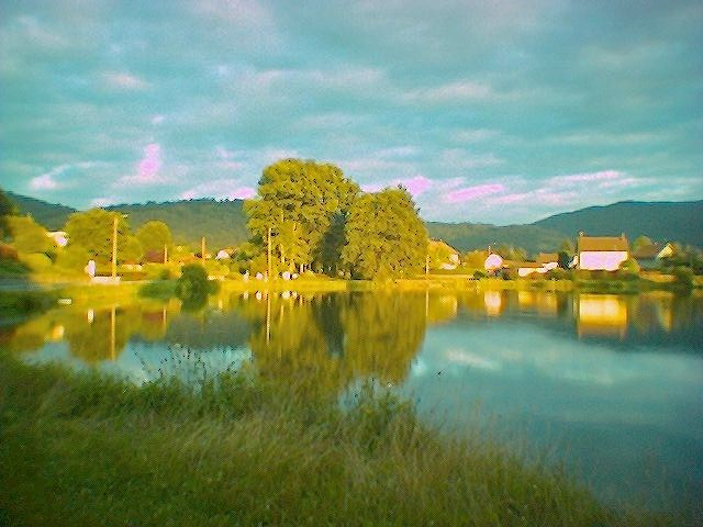 Le Thillot (Vogesen, Frankreich), See am Stadtrand